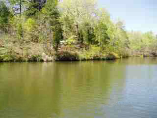 Logan Martin Dam, Coosa River, Alabama